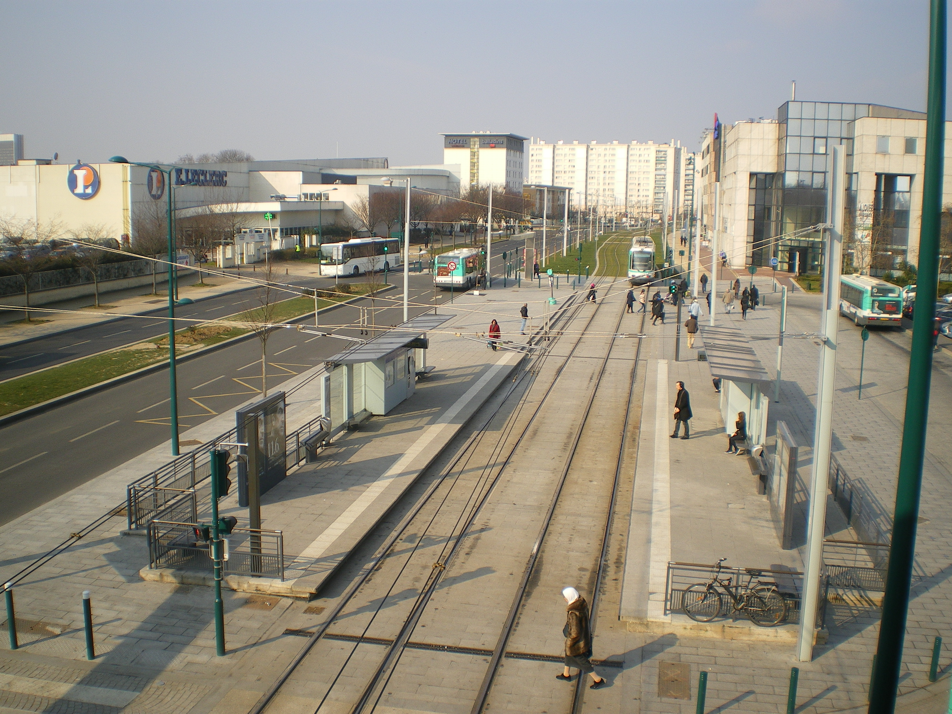 Gennevilliers RER - La station du T1 Vue depuis les quais de la Gare